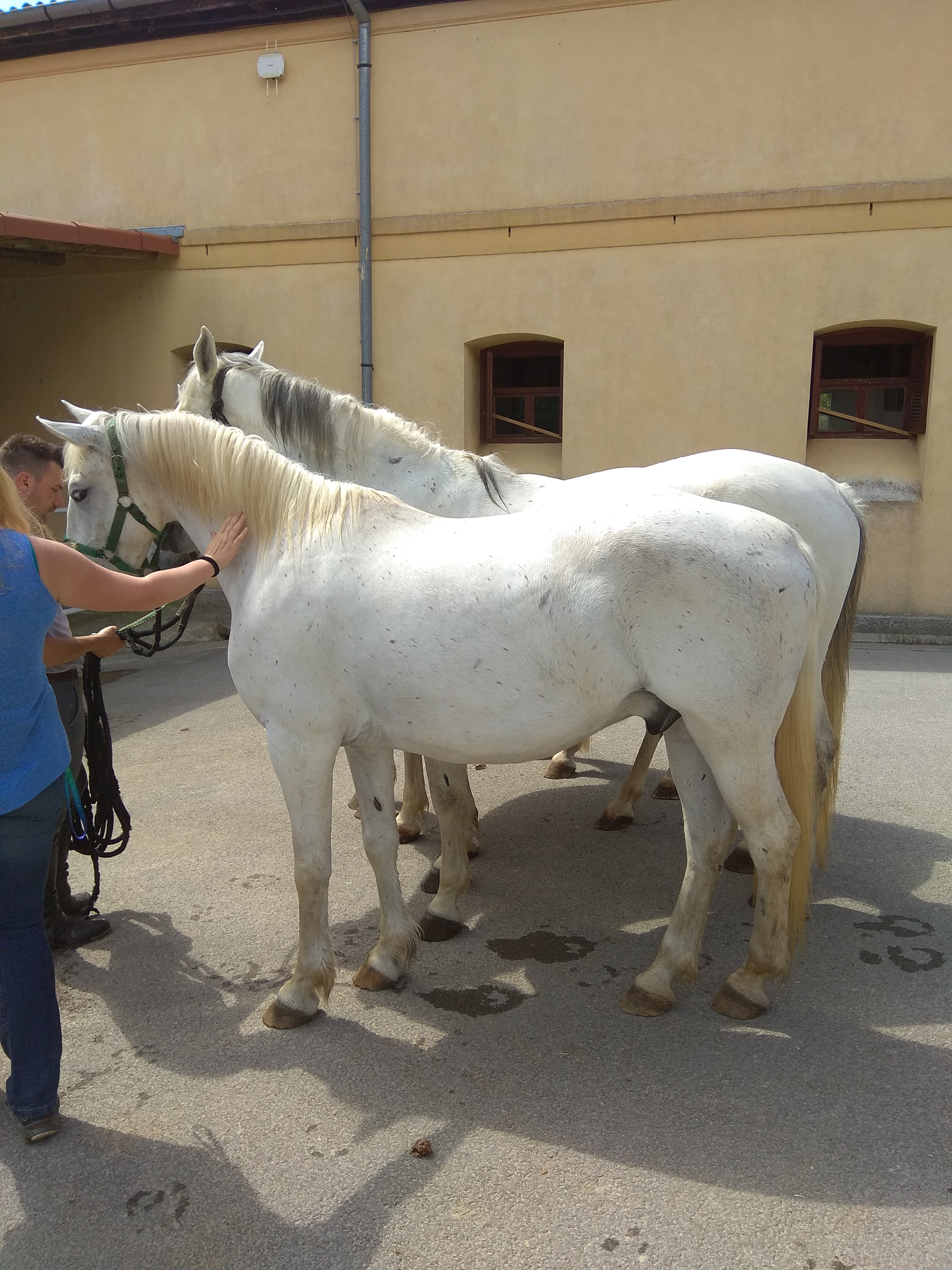 סוסים בחוות הסוסים בליפיצה